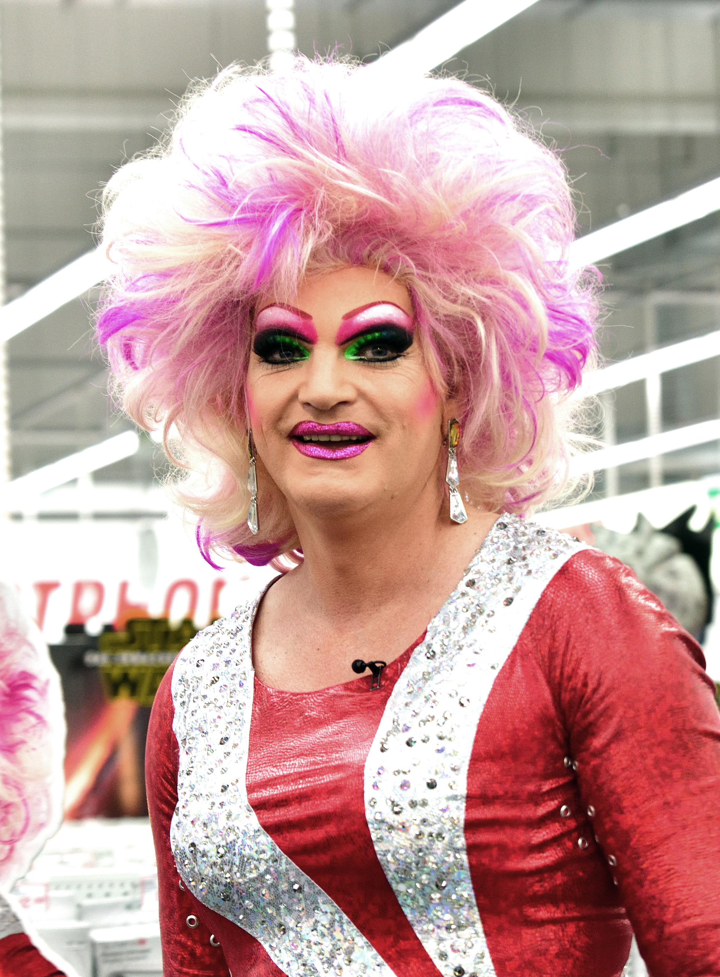 Olivia Jones bei einer Veranstaltung in Elmshorn